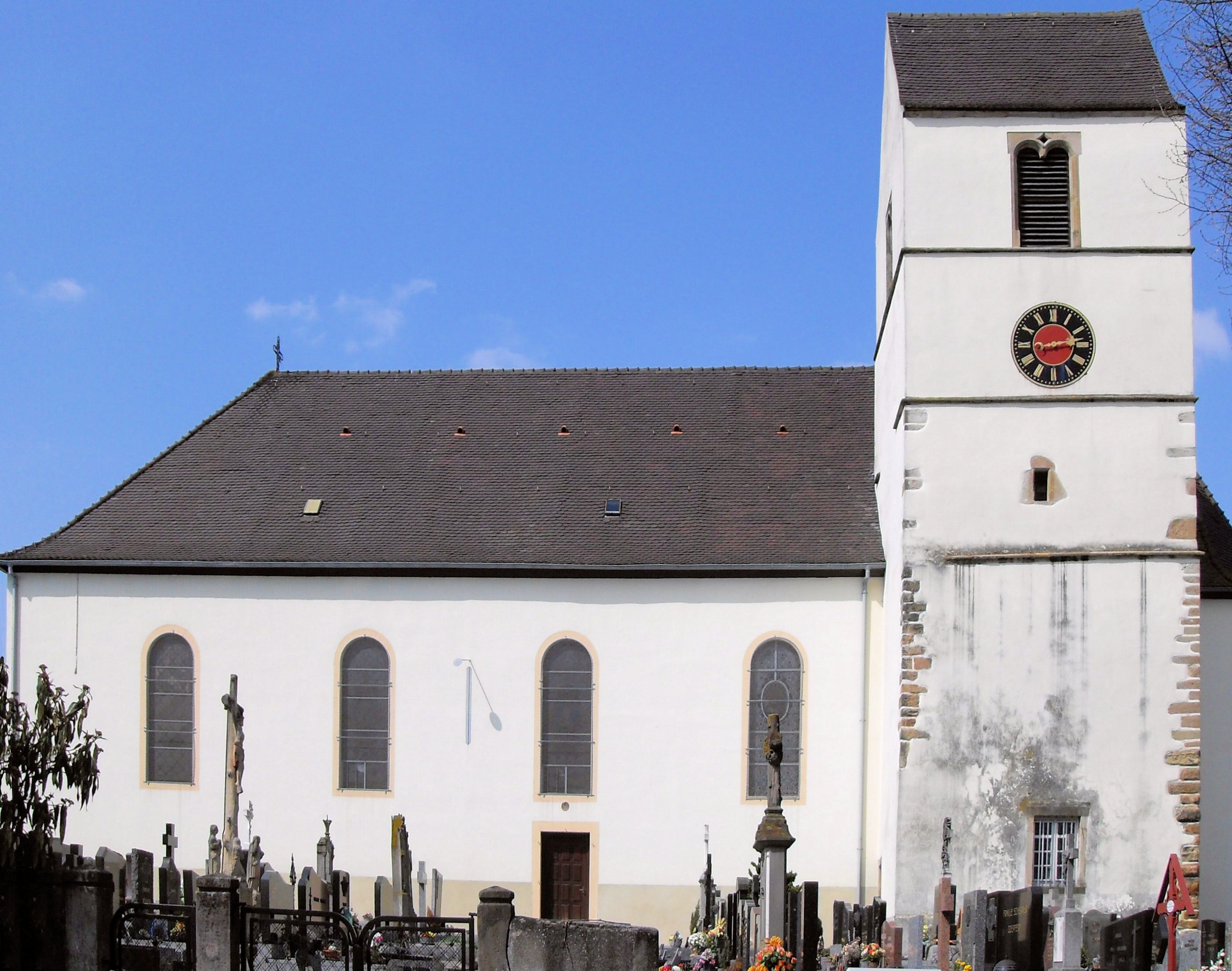 L'èglise Saint-Léger à Schlierbach